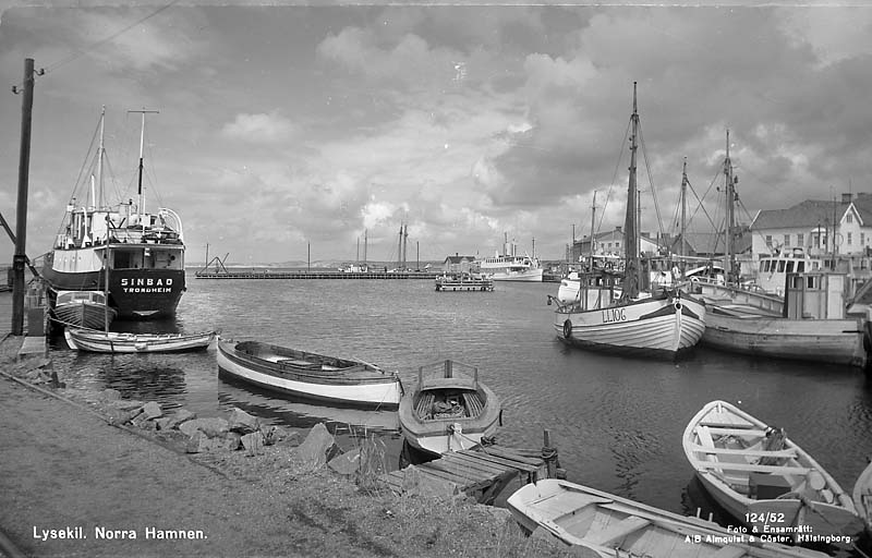 Norra hamnen. Motiv: Lysekil Nyckelord: Riksintressen Kategori: Kust- och skärgårdsmiljö, Hamnmiljöer Norra hamnen.